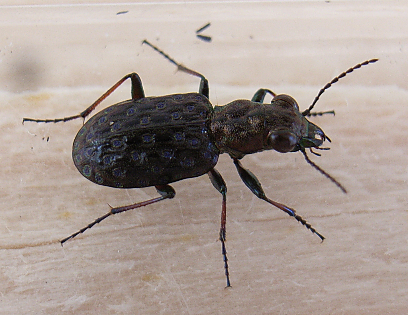 Elaphrus cupreus